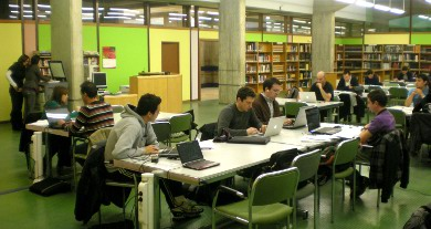 Usuarios de la Biblioteca Pública de Palencia utilizando el servicio de Wi-Fi.